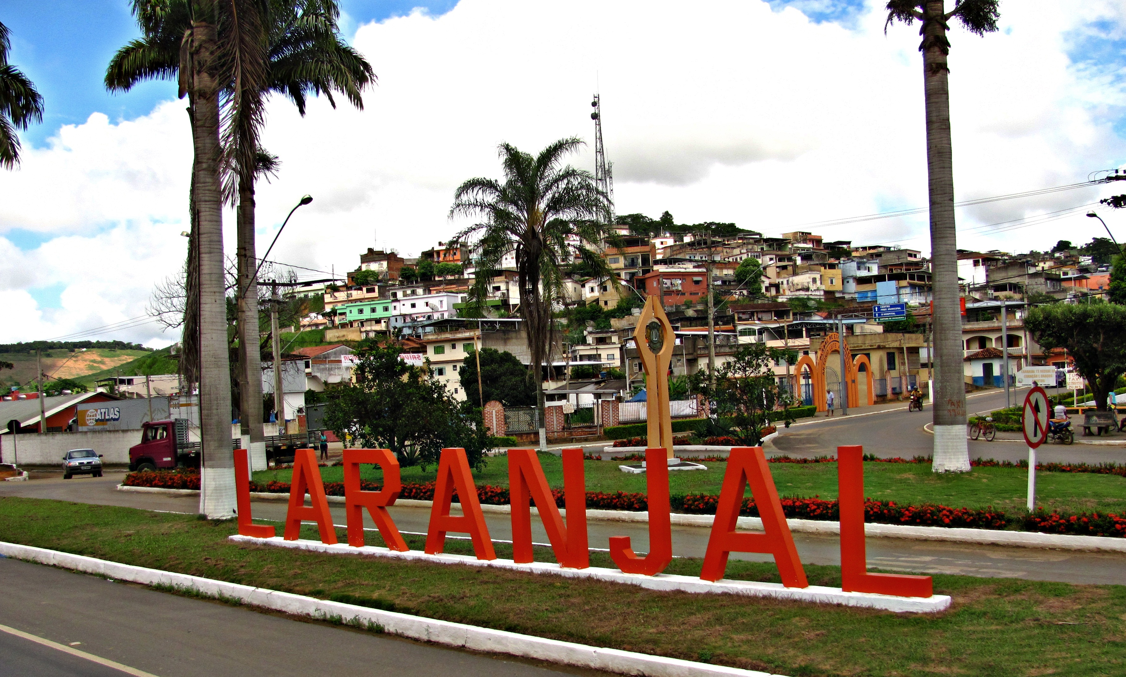 Entrada da cidade mineira de Laranjal.